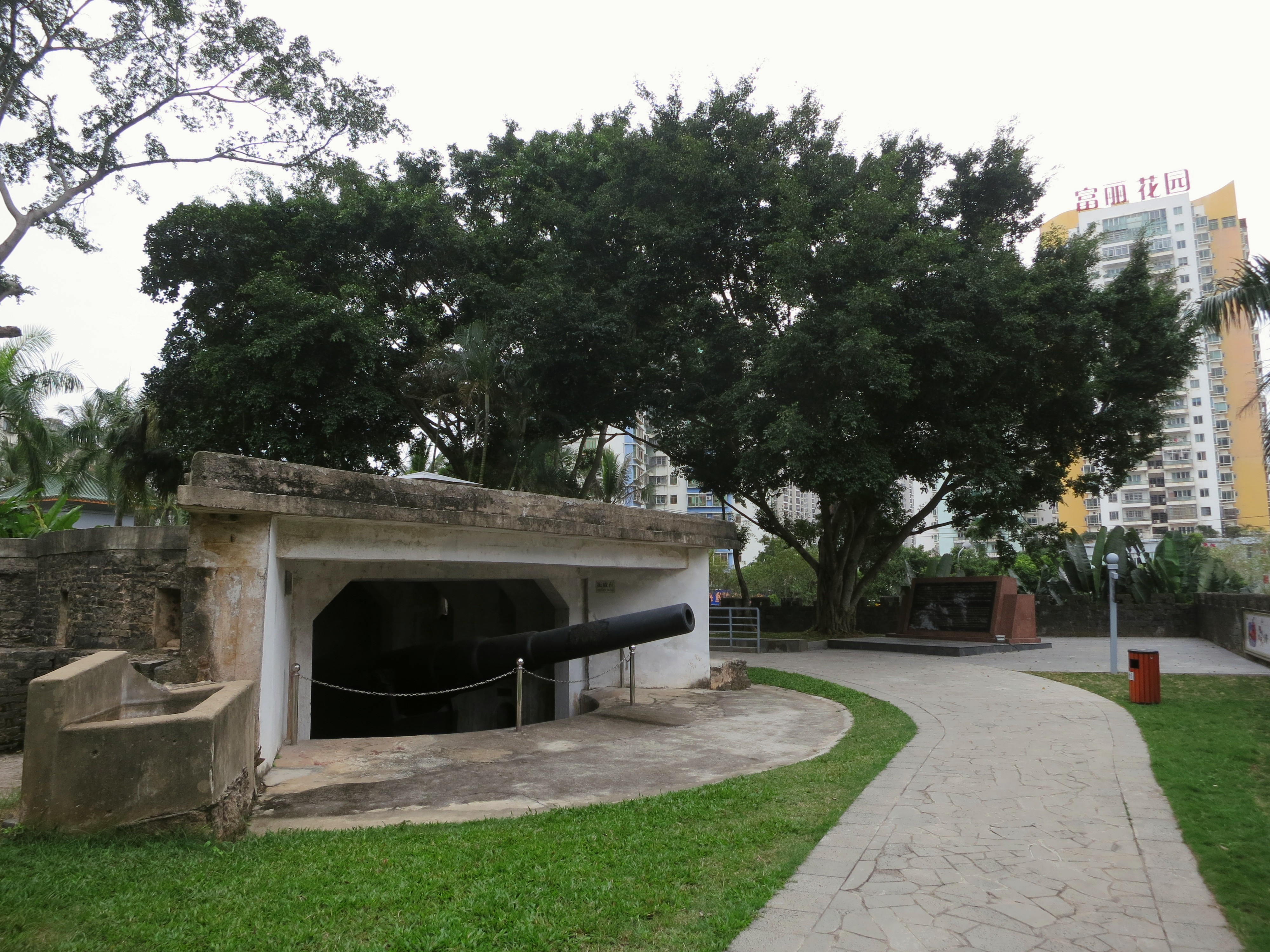 秀英炮台 - Xiuying Fortress - 2016.01